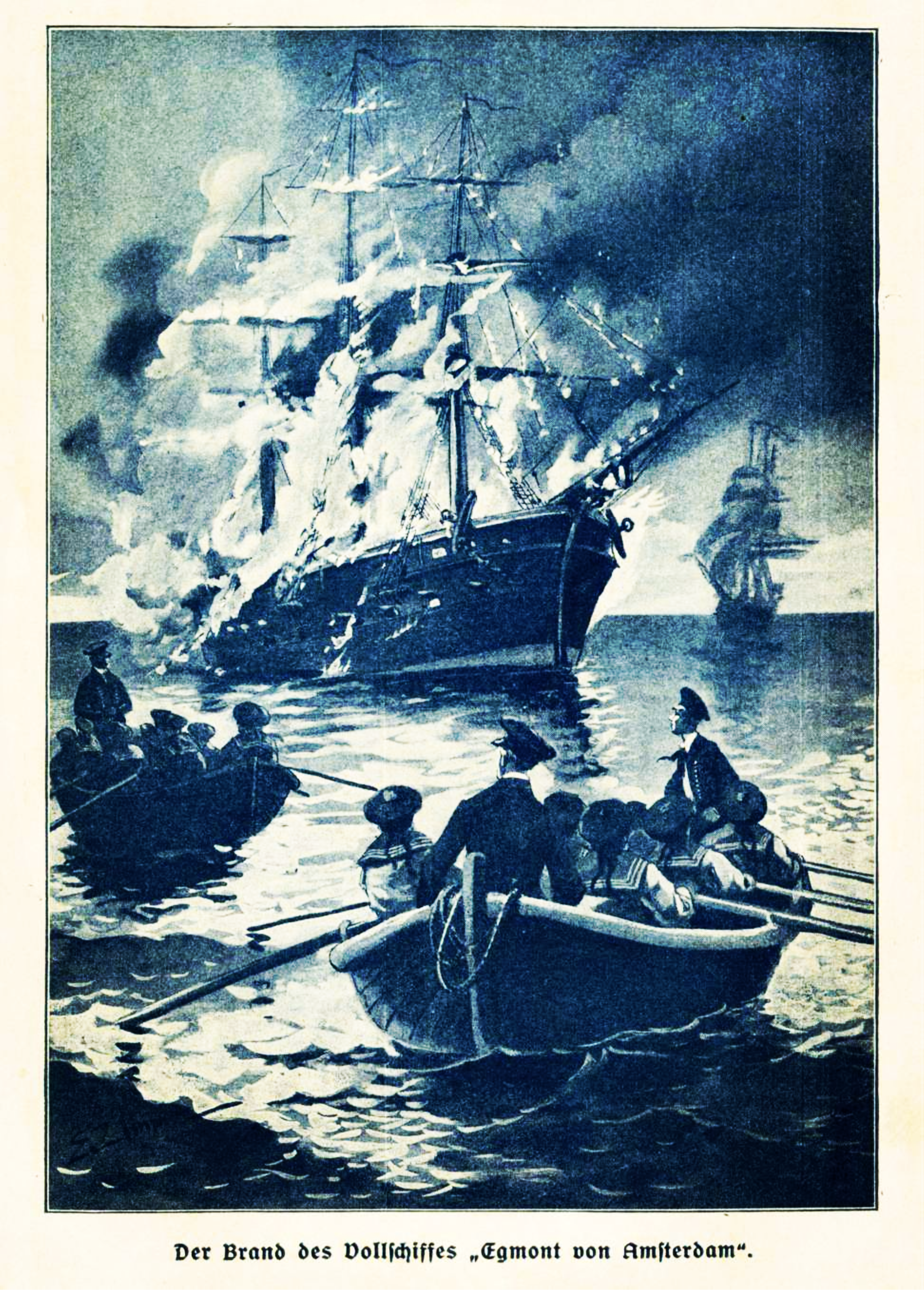 Der Brand des Vollschiffs „Egmond von Amsterdam“. In: Der Vampyr. Eine Seegeschichte von Friedrich Meister. Leipzig: Verlag von Abel u. Müller (1911)